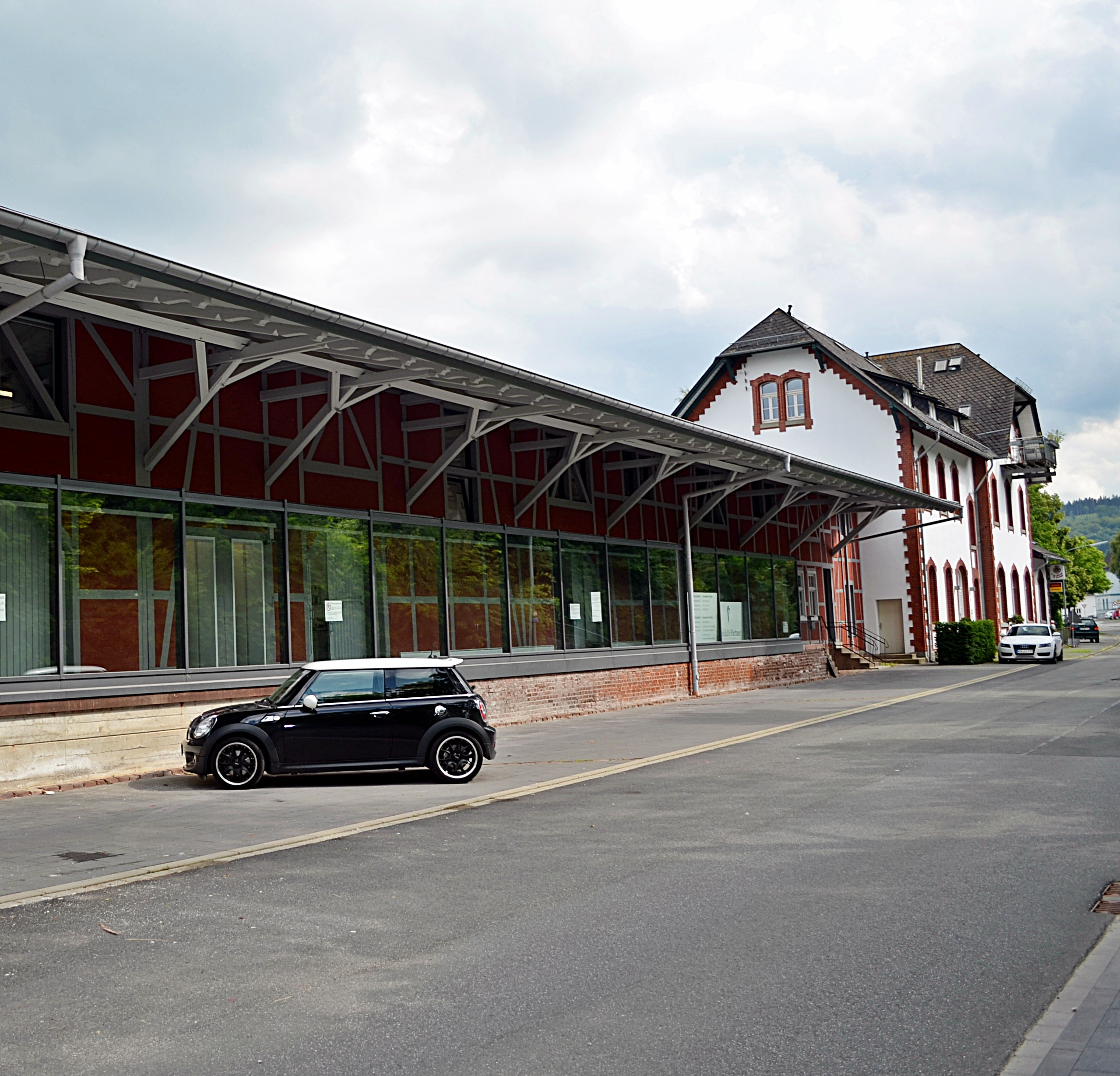 Brilon, denkmalgeschütztes altes Bahnhofsgebäude und ehemaliger Güterschuppen